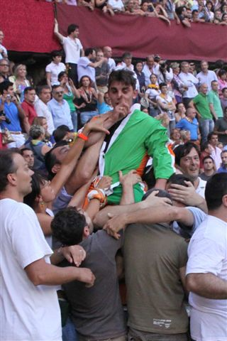 Momenti del Palio di Provenzano 2010 vinto dalla Selva con Silvano Mulas e Fedora Saura